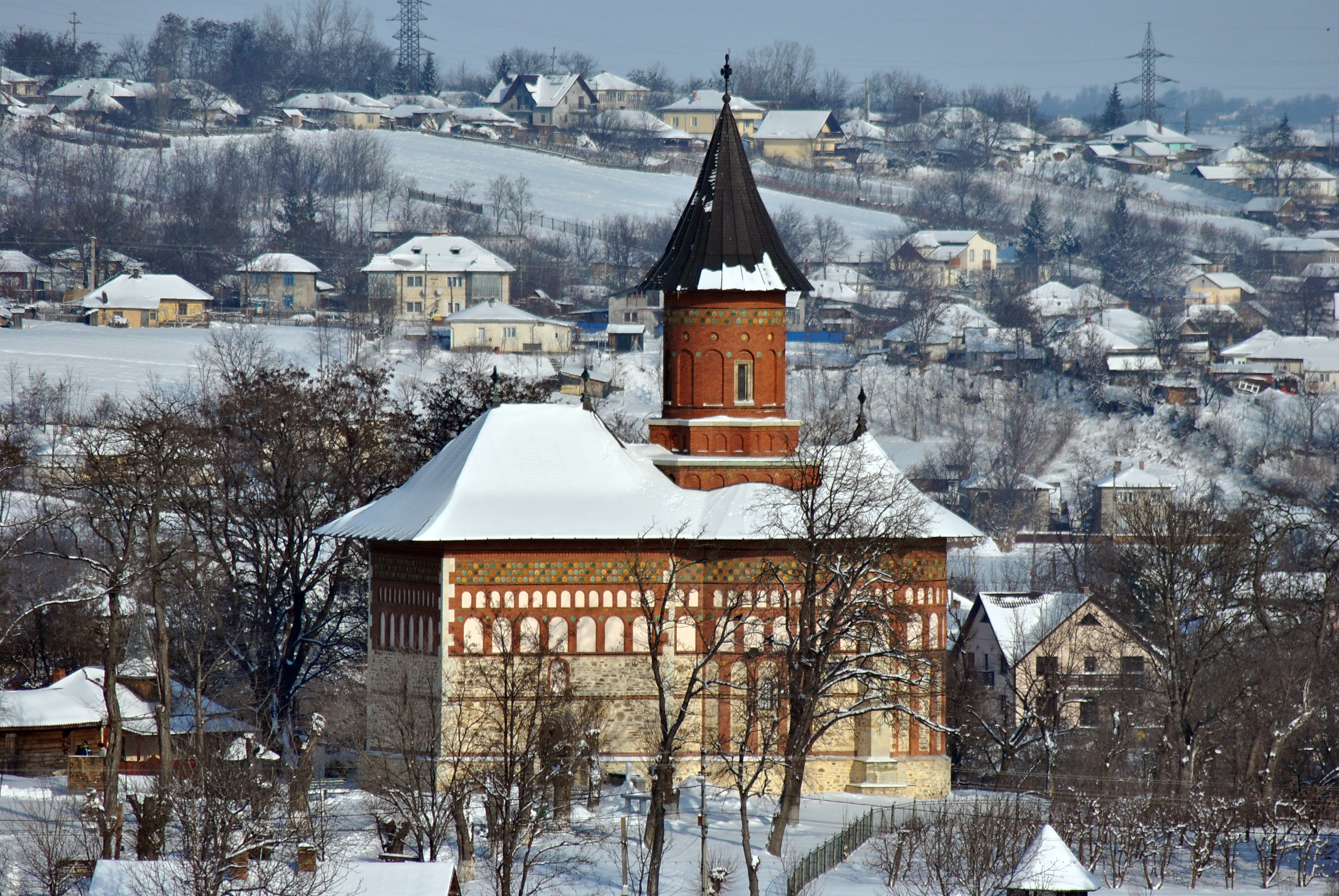 Biserica Sfântul Nicolae Domnesc din Dorohoi, județul Botoșani, România. 13.